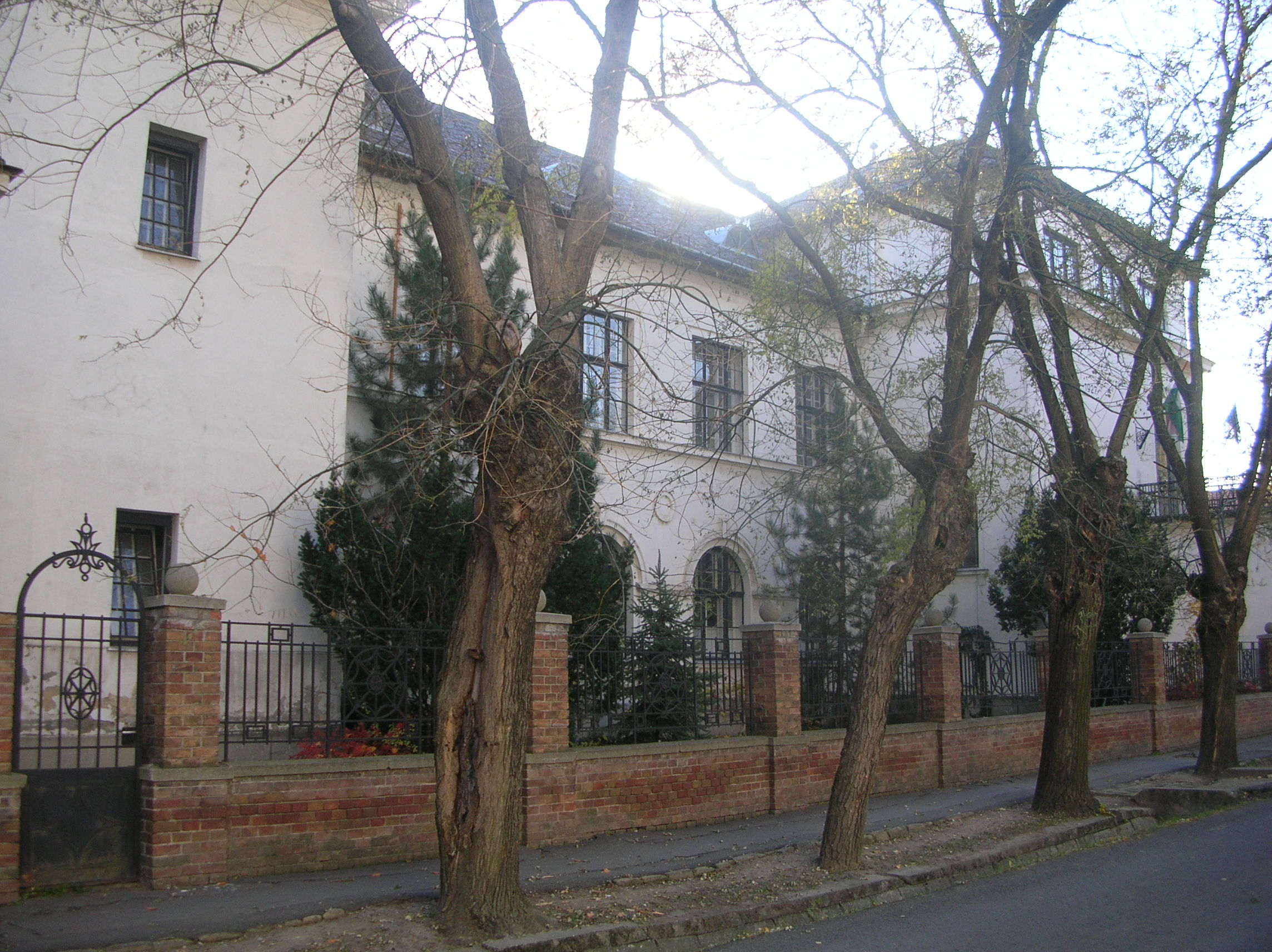 A makói belvárosi iskola virágudvara